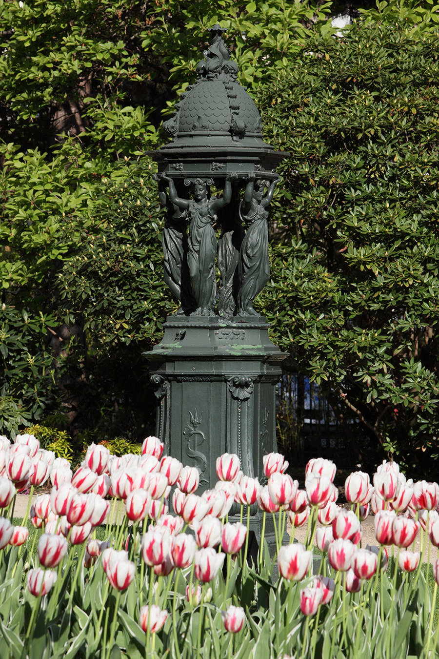 Fontaine Wallace dans le parc du Docteur Victor-Roy (de l'Hôtel de Ville) La Garenne-Colombes (92250) © Christophe Taamourte / La Garenne-Colombes